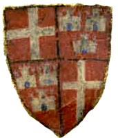 Escudo de armas de Juan Fernández de Heredia en el íncipit de la Crónica de conquiridores. Libros I-XI, s. XIV. Ms. 12367 y 10134bis. Véase Alberto Montaner, «La problemática del número de elementos en las armerías medievales: diseño frente a representación», Miguel Metelo de Seixas y Maria de Lurdes Rosa (coord.), Estudos de Heráldica Medieval, Lisboa, Instituto de Estudos Medievais; Centro Lusíada de Estudos Genealógicos e Heráldicos, 2012, págs. 125-142; cfr. esp. págs. 131-134. ISBN 978-989-97066-5-1